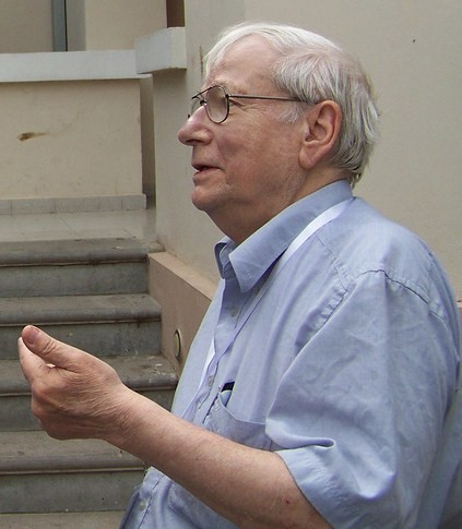 השקת "עברית", הקורא האלקטרוני של ידיעות טכנולוגיות, ניופאן וסטימצקי, ב"בית ביאליק" בתל אביב, 26.5.2010.